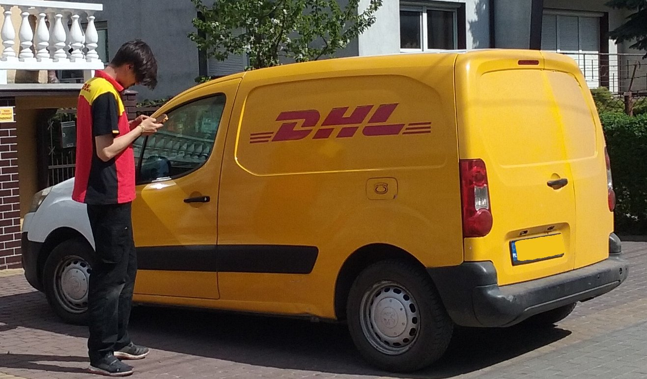 Tomaszów Mazowiecki w województwie łódzkim, PL, EU. Kurier DHL w Tomaszowie Mazowieckim, CC0